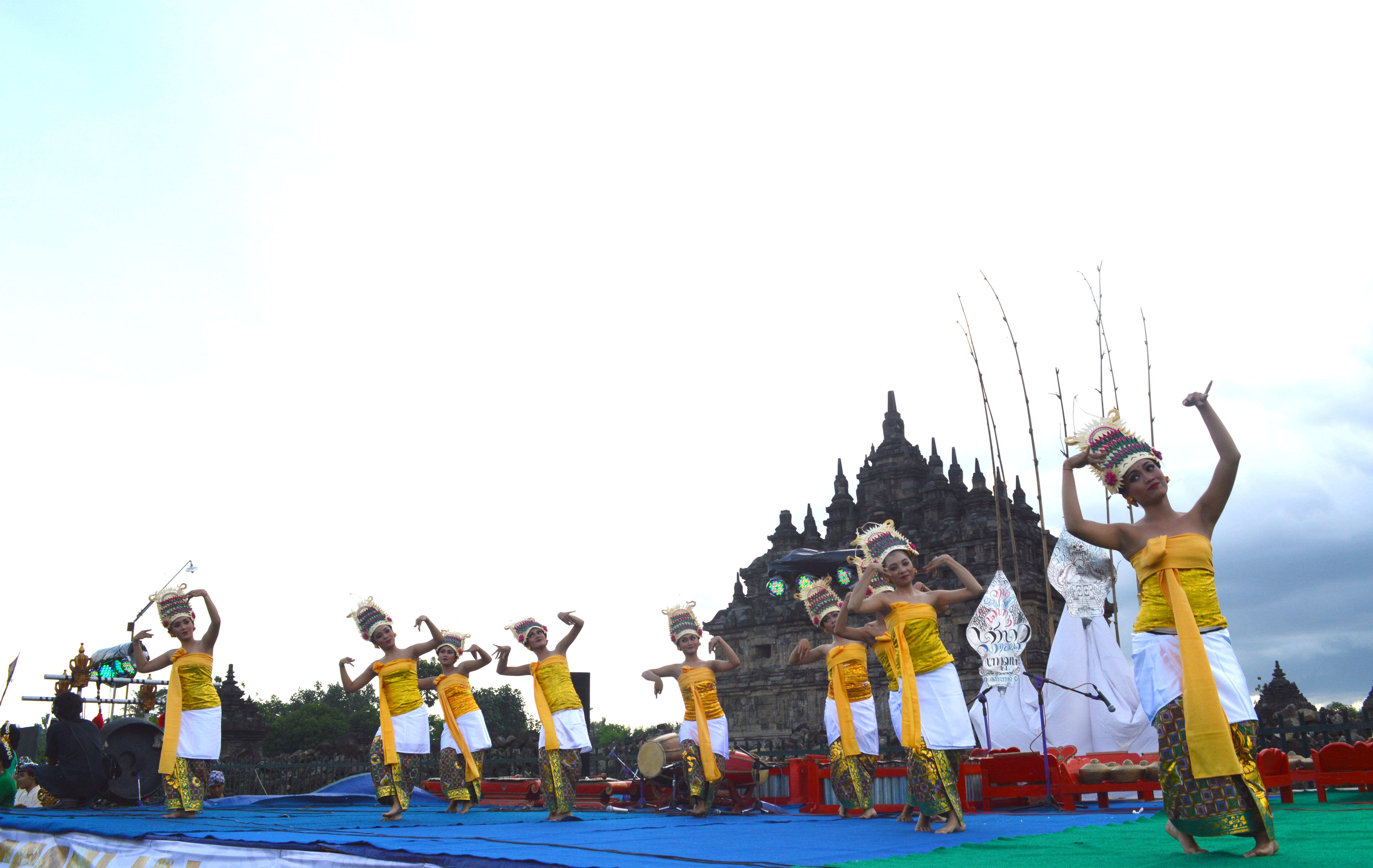 Penari Festival Candi Kembar